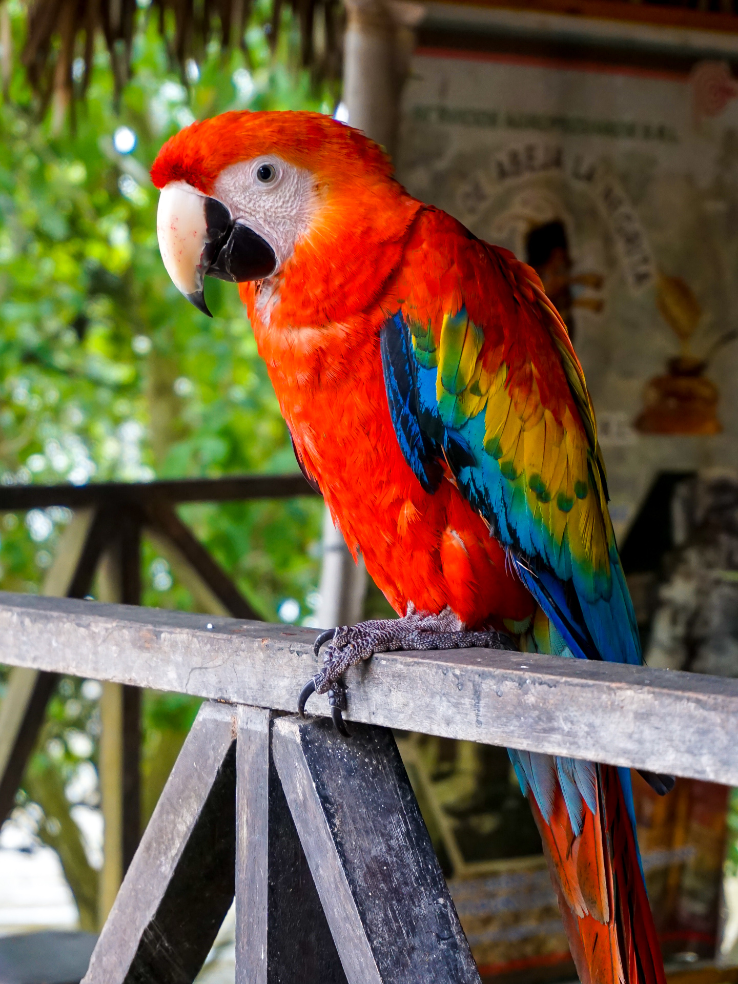 Fotografía de un guacamayo Ara Macao, acompañante de los nativos.